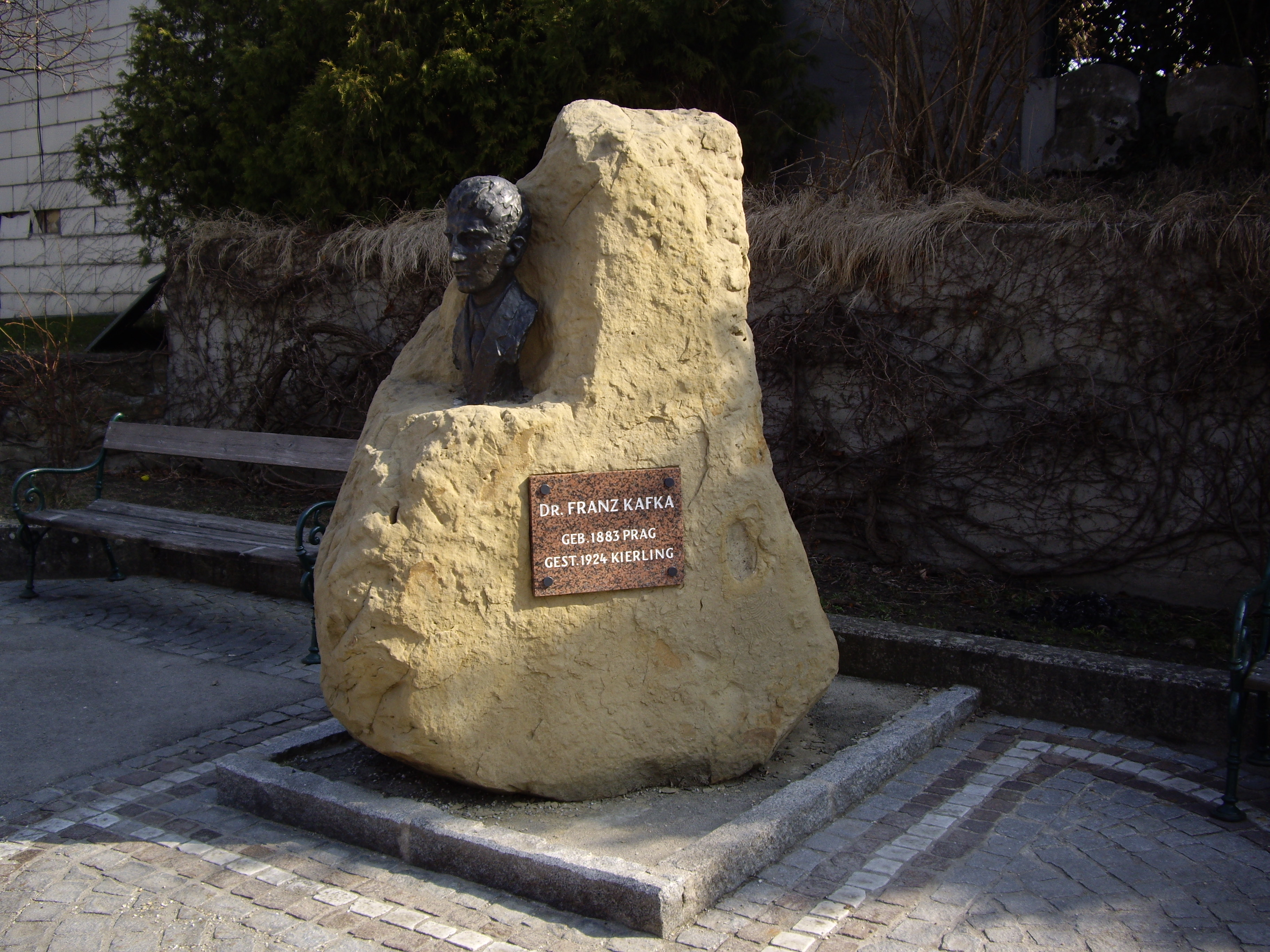 Monumento de Franz Kafka en Kierling